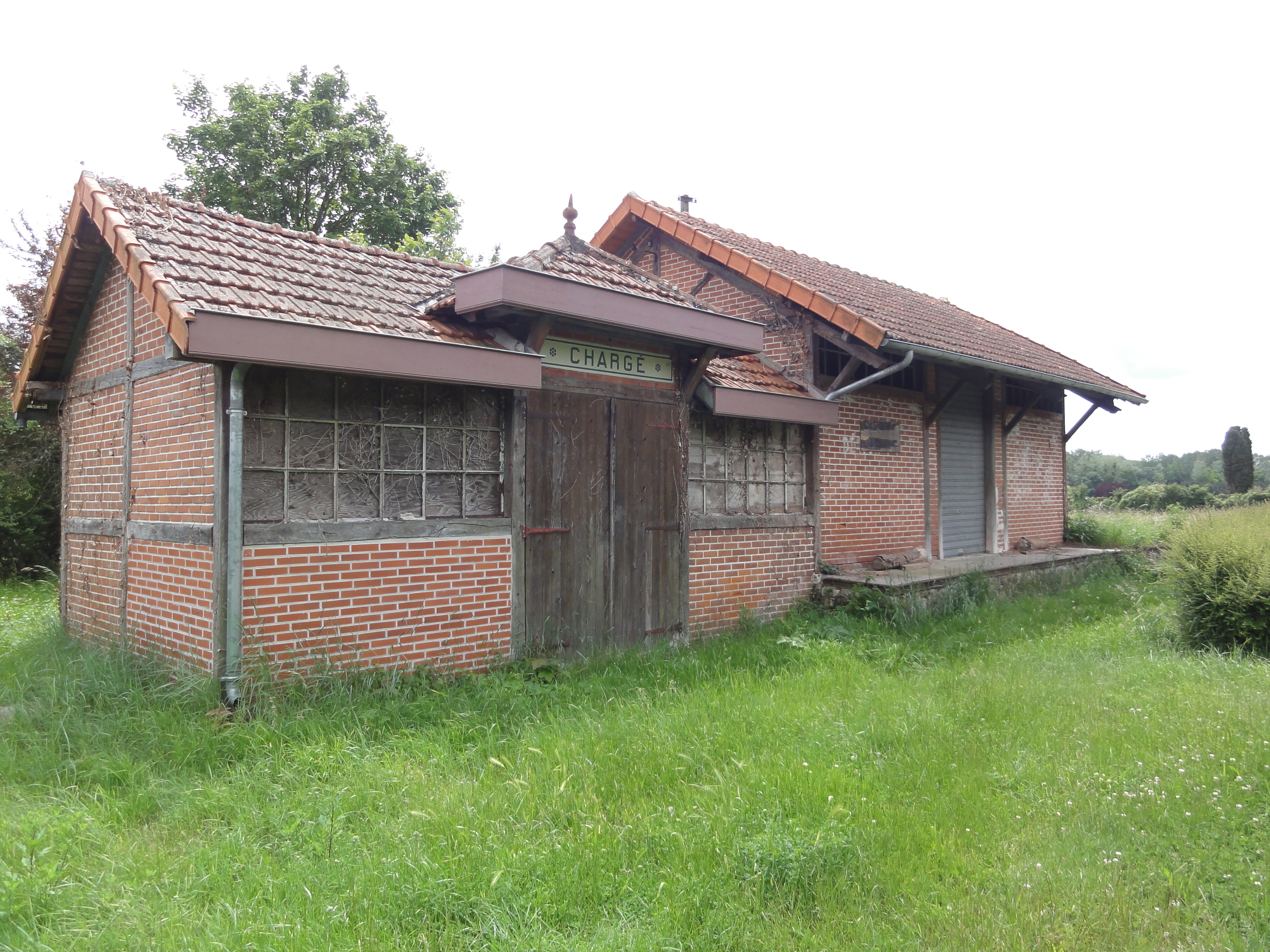 Chargé (Indre-et-Loire) la plus ancienne gare